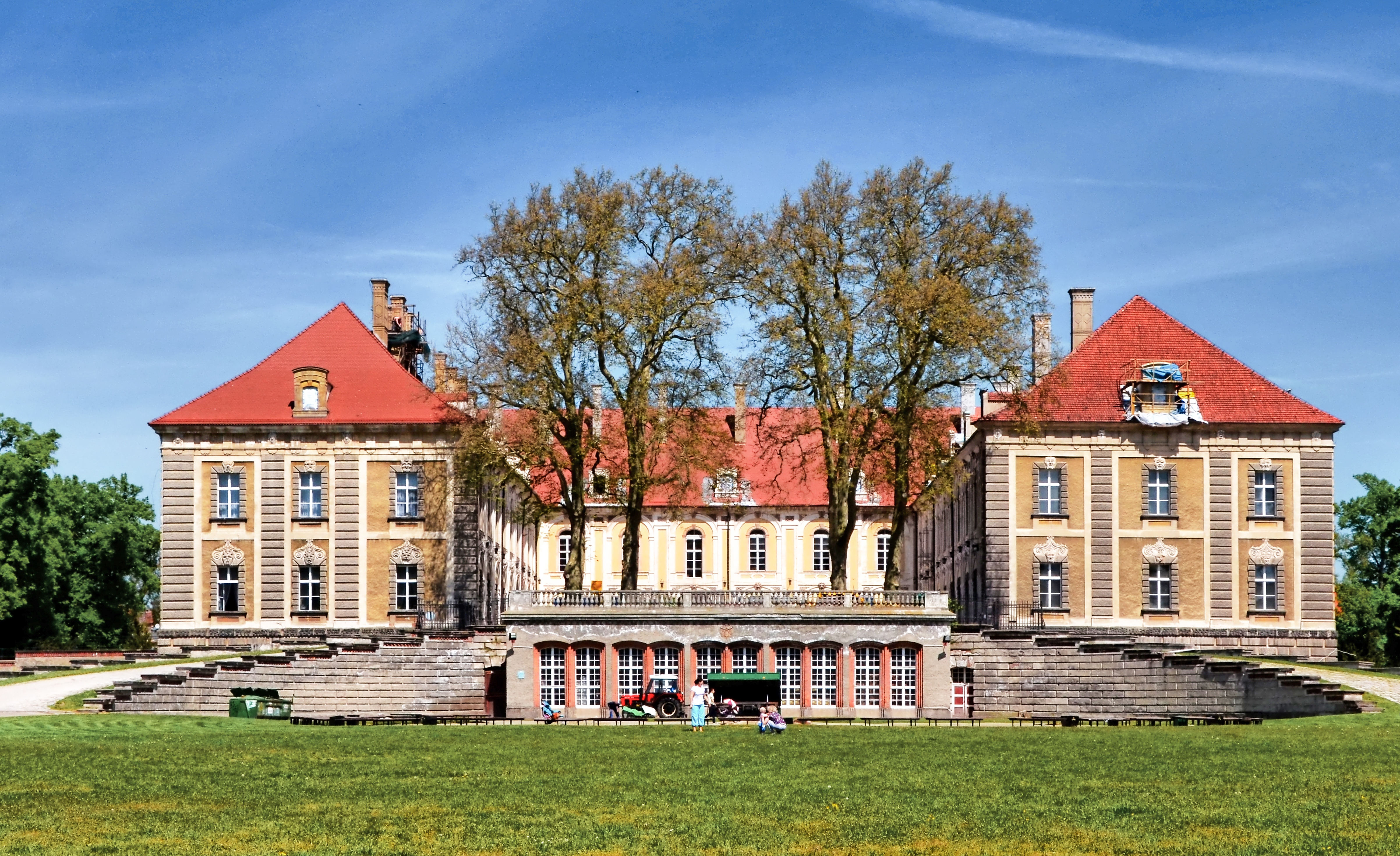 Barokowy pałac Lobkowitzów w Żaganiu przy ulicy Szprotawskiej 4. Widok od strony parku. Obecnie Żagański Pałac Kultury. Miasto Żagań.